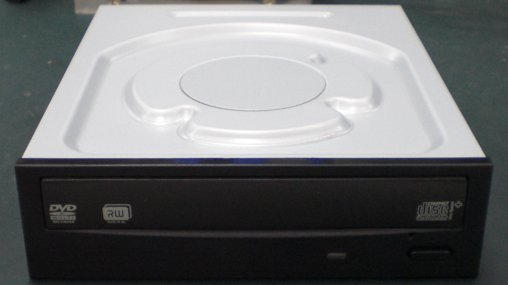 中文（台灣）: 2011年2月製造的華碩DVD燒錄機DRW-24B3ST/BLK/B/AS